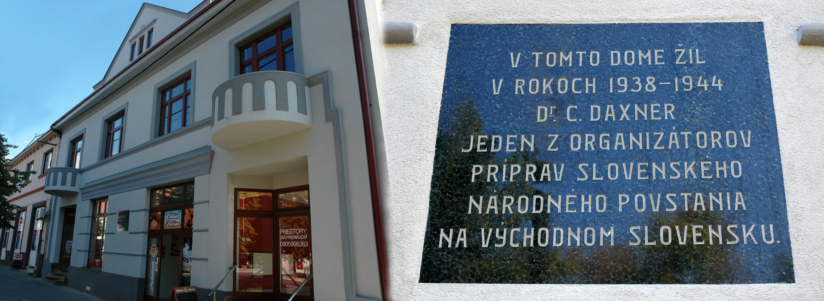 Dom v centre Vranova, v ktorom v rokoch 1938 až 1944 býval Dr. Cyril Daxner, významný organizázor SNP na východnom Slovensku a detail na jemu venovanú pamätnú tabuľu.